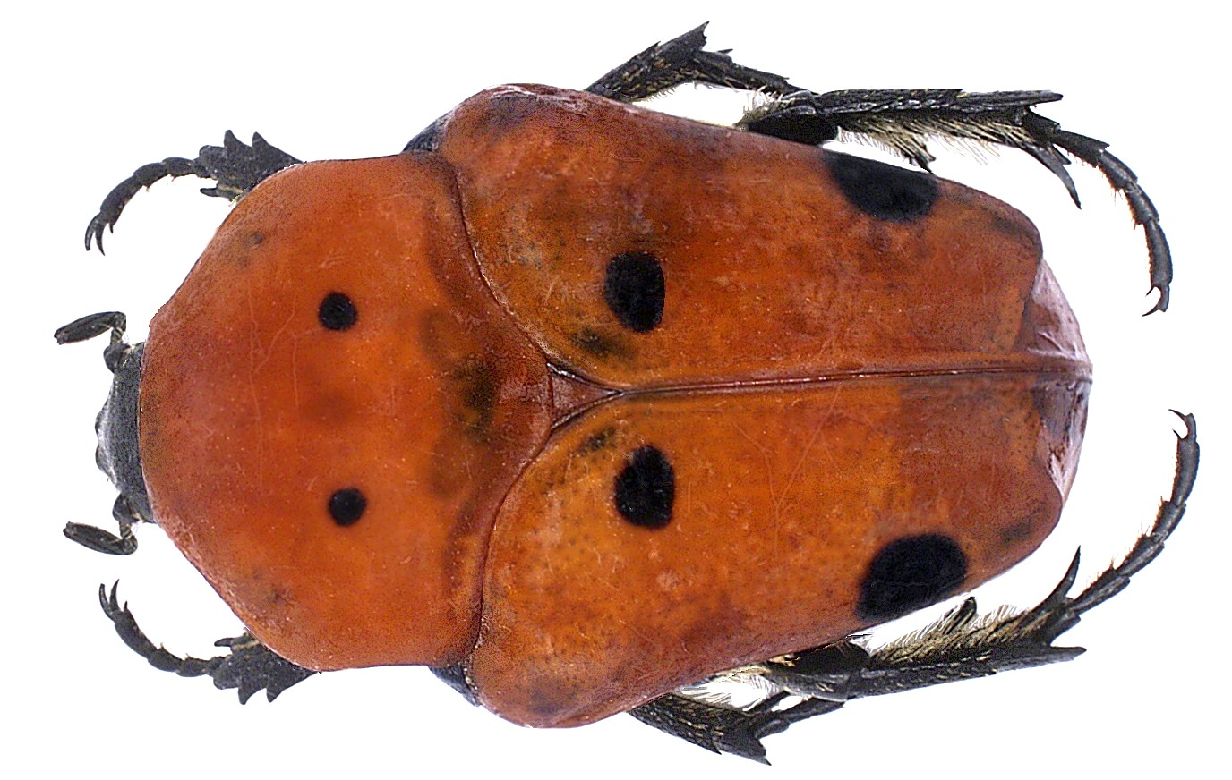 Familie: Scarabaeidae Grösse: 24 mm Fundort: Madagascar det. U.Schmidt, 2006 Foto: U.Schmidt, 2006